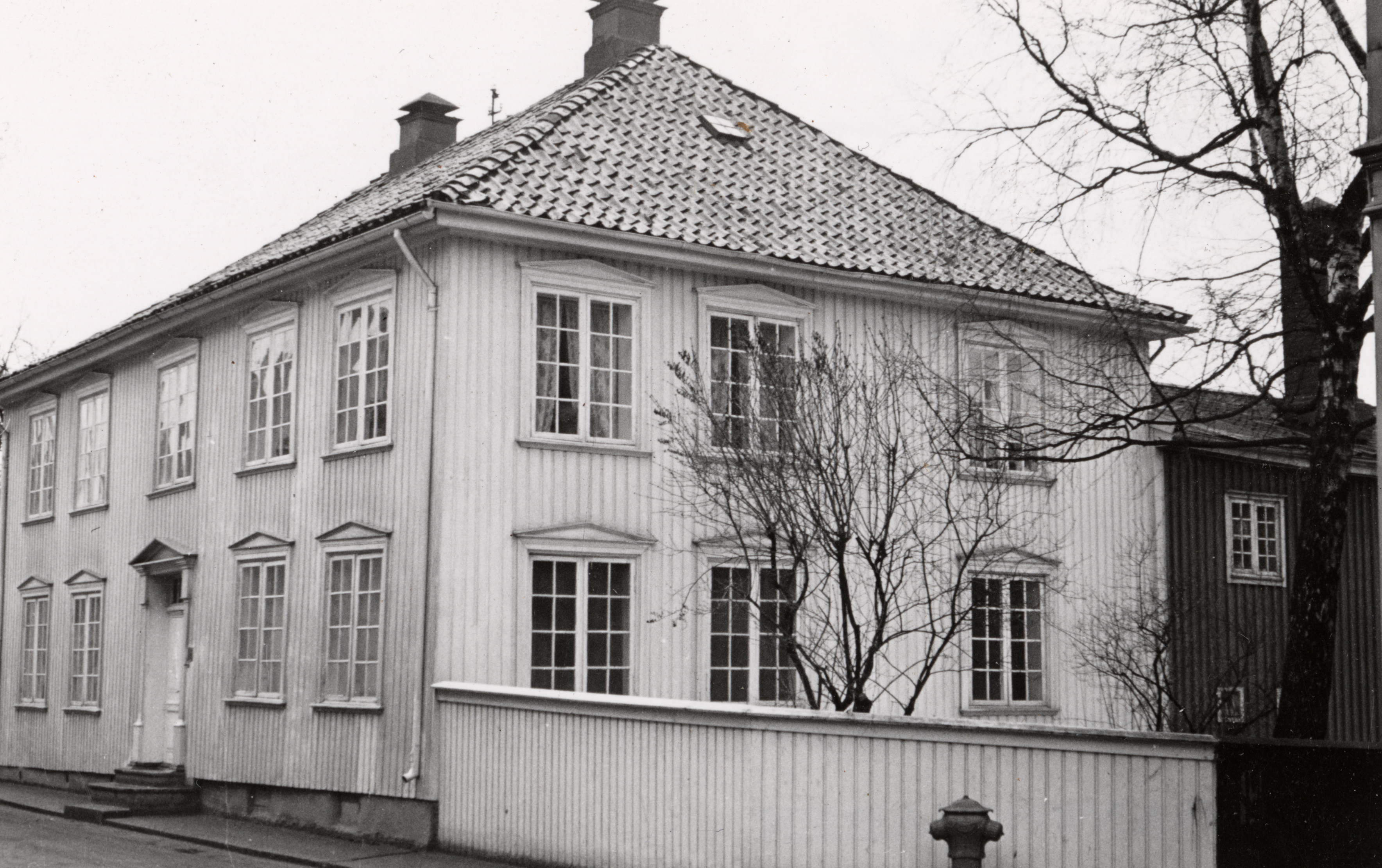 Føyngården, Foyngården i Tønsberg, Vestfold This image on crowdsourcing geotagging platform Fotodugnad